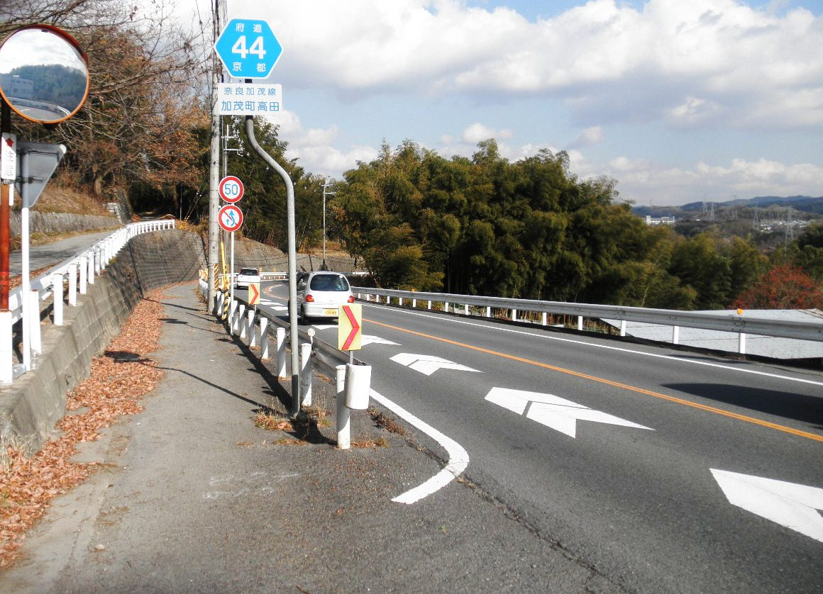 京都府木津川市加茂町高田鶉原 奈良県道・京都府道44号奈良加茂線